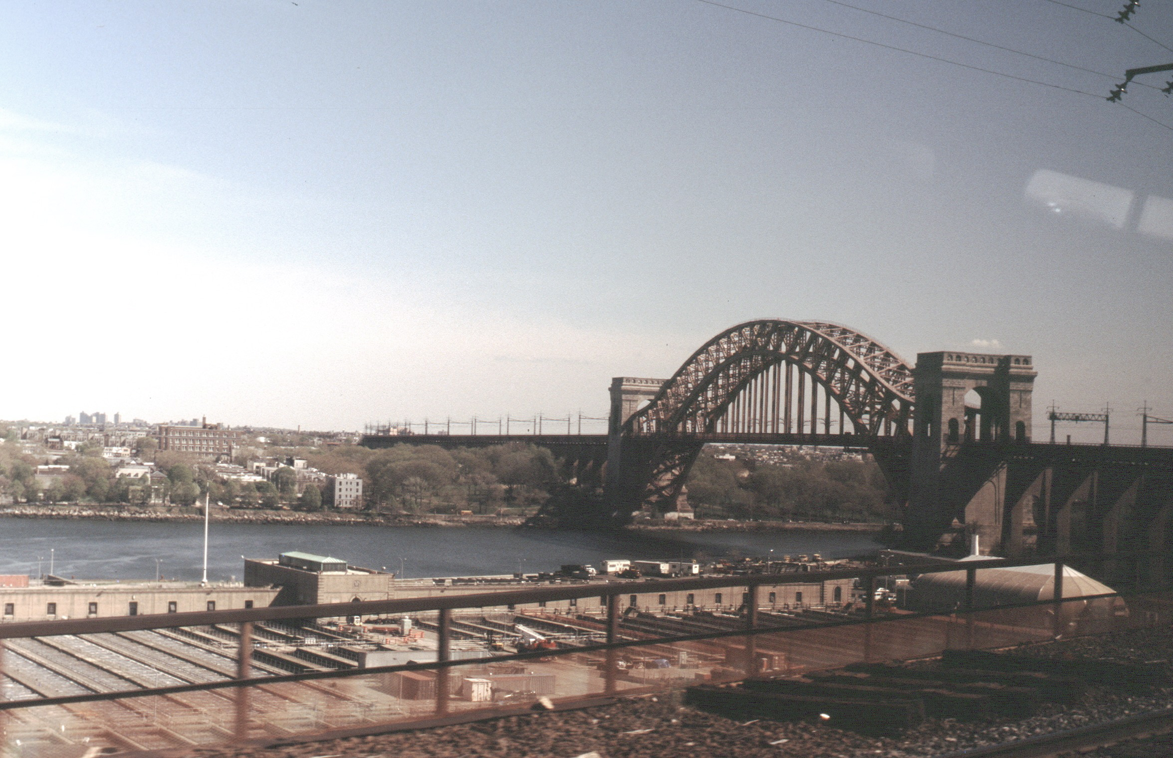 Hell Gate Bridge in New York Citiy